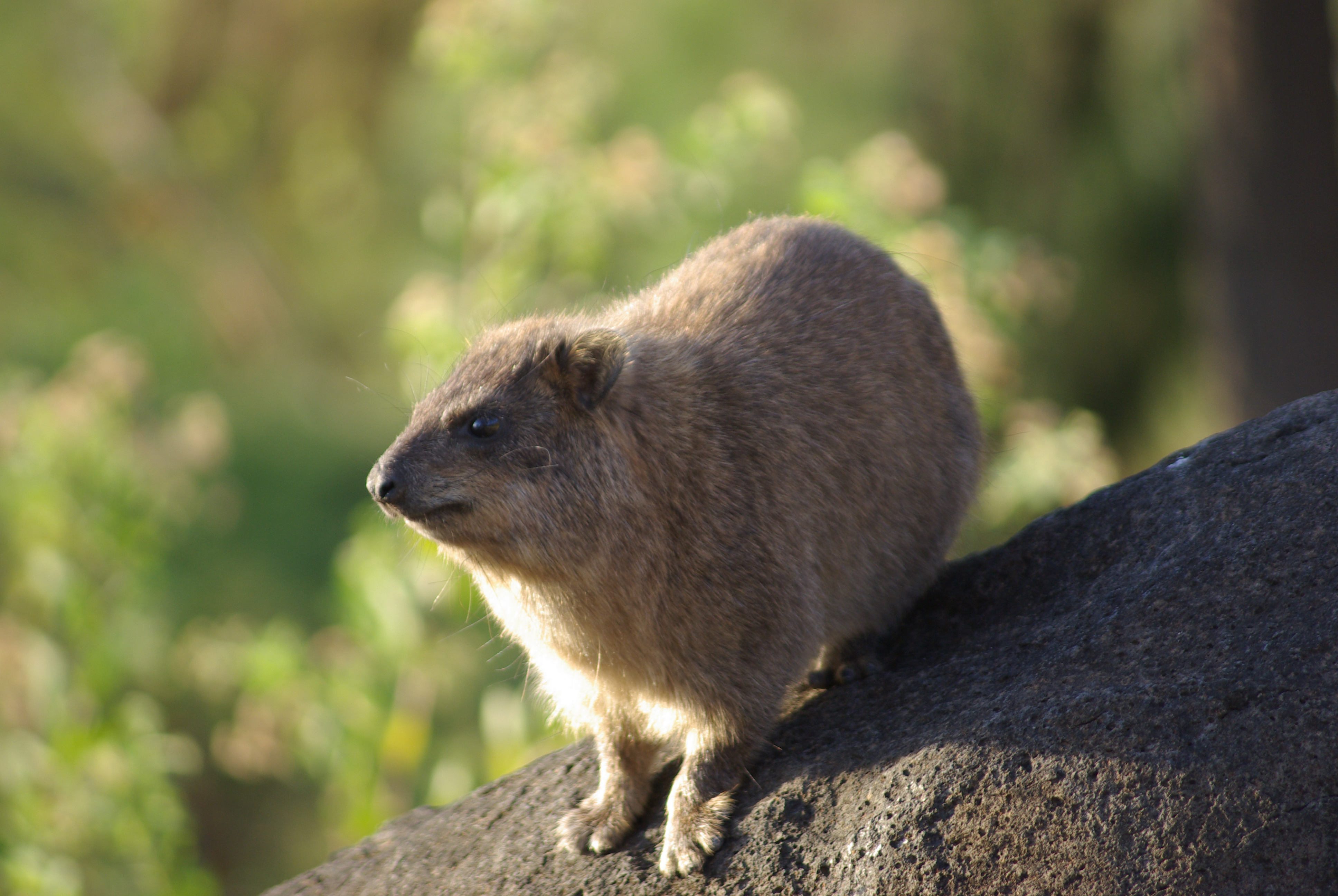 Klippschliefer in Tabgha am See Genezaret